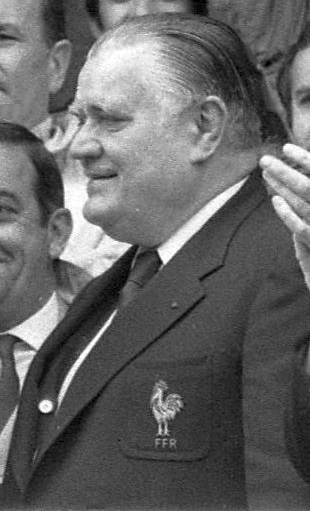 Albert Ferrasse en 1985 (cropped).